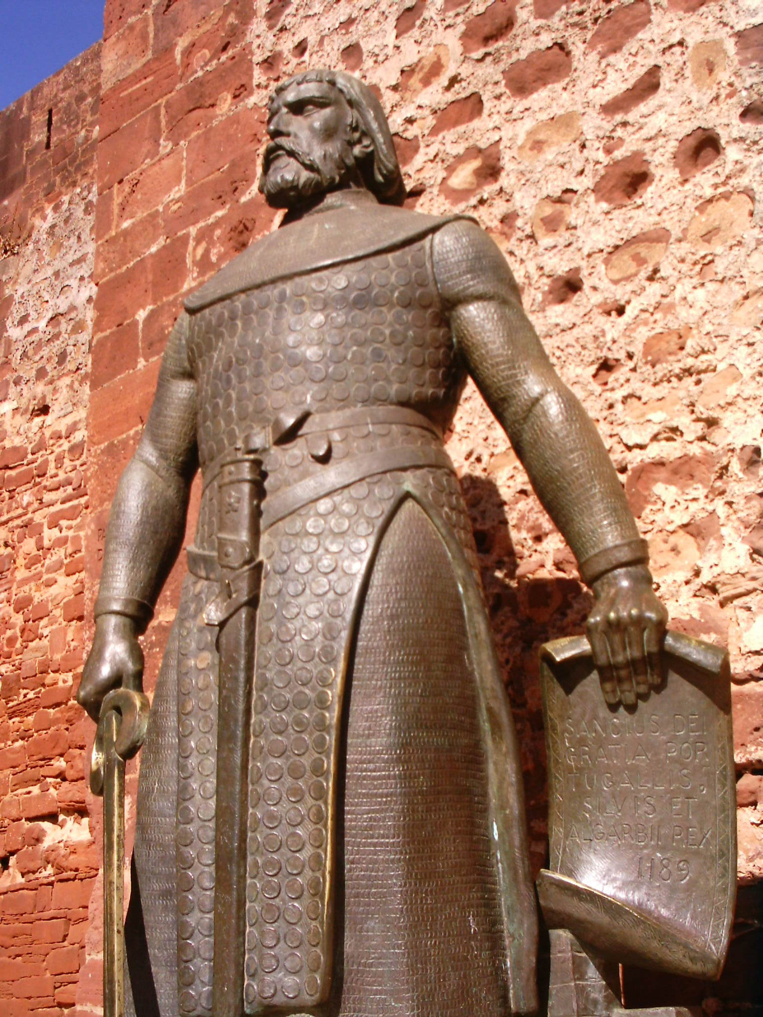 Estátua de D. Sancho I frente à entrada do Castelo de Silves, Silves, Portugal.